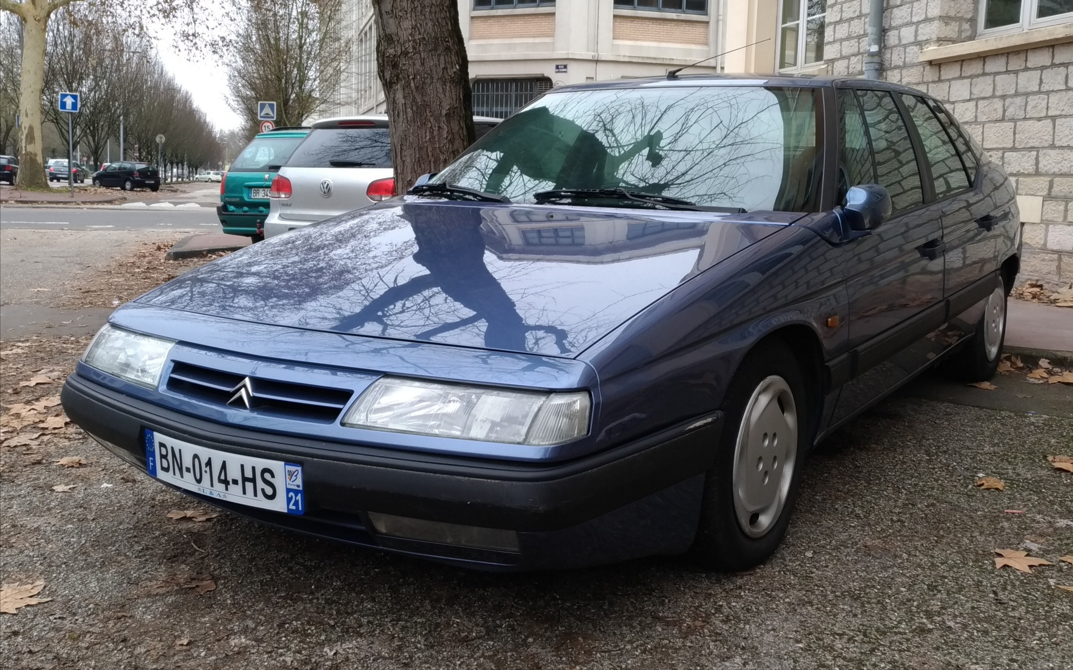 Citroen XM